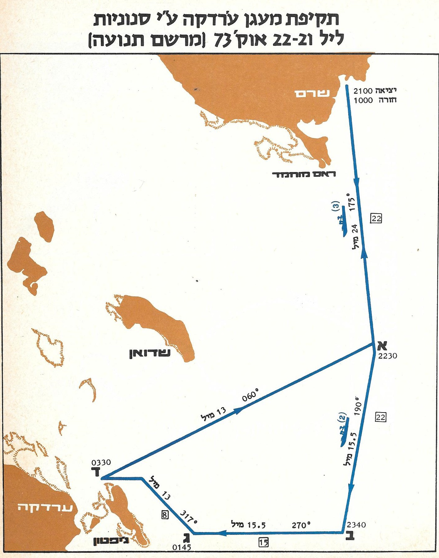 תרשים תנועת הסנוניות לתקיפה בנמל ע'רדקה מגבית 16